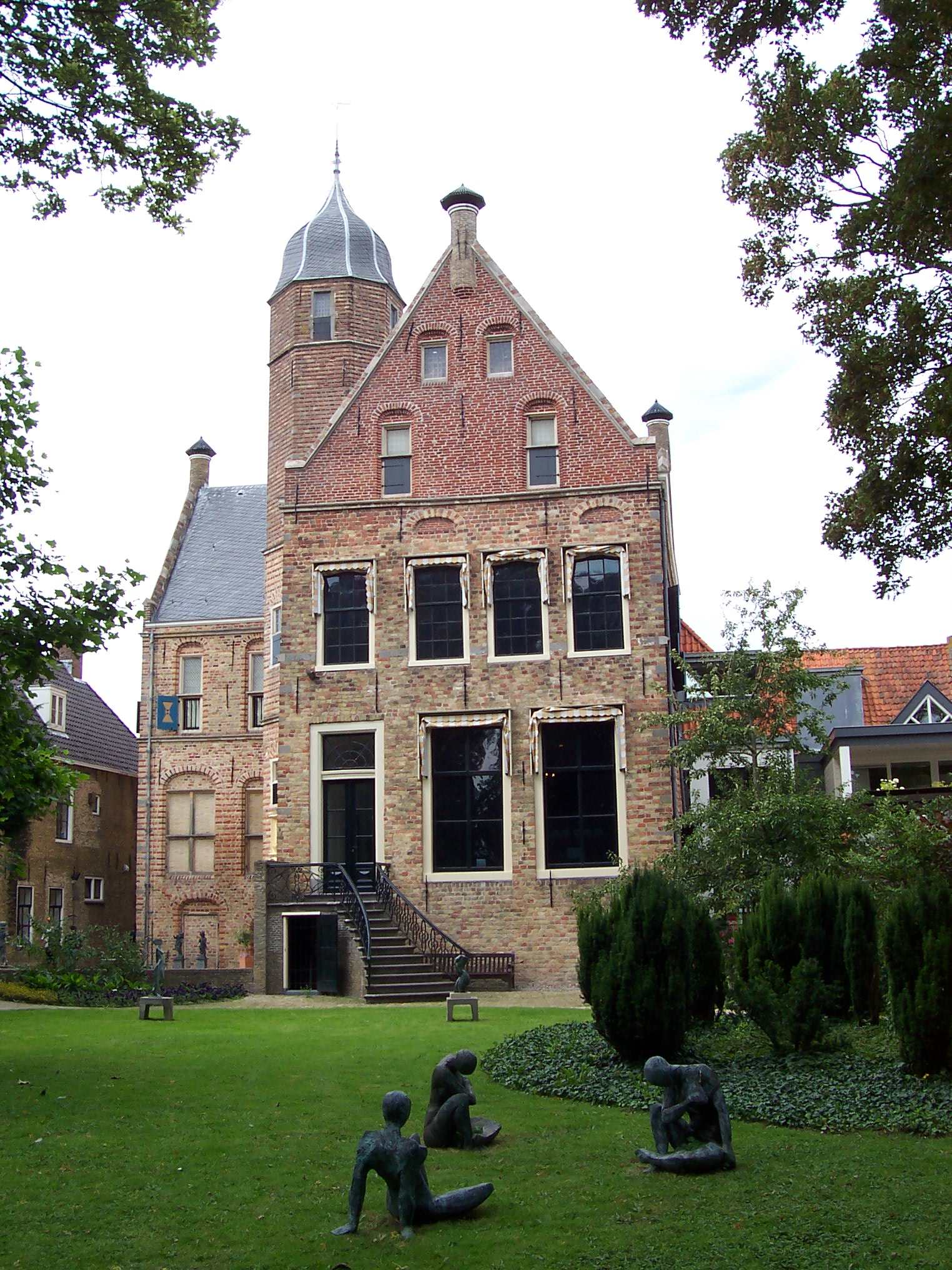 Frjentsjer, Martenastins efterkant